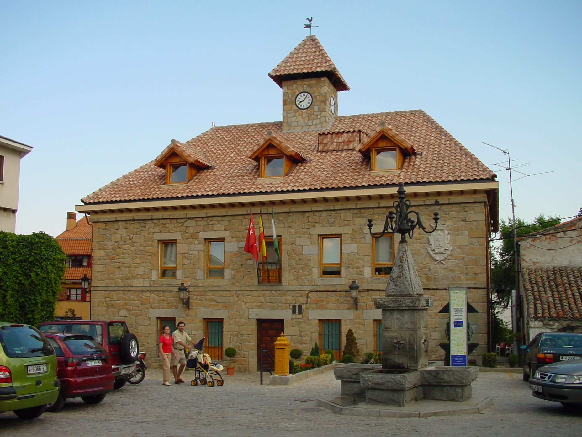 Ayuntamiento de Navacerrada.